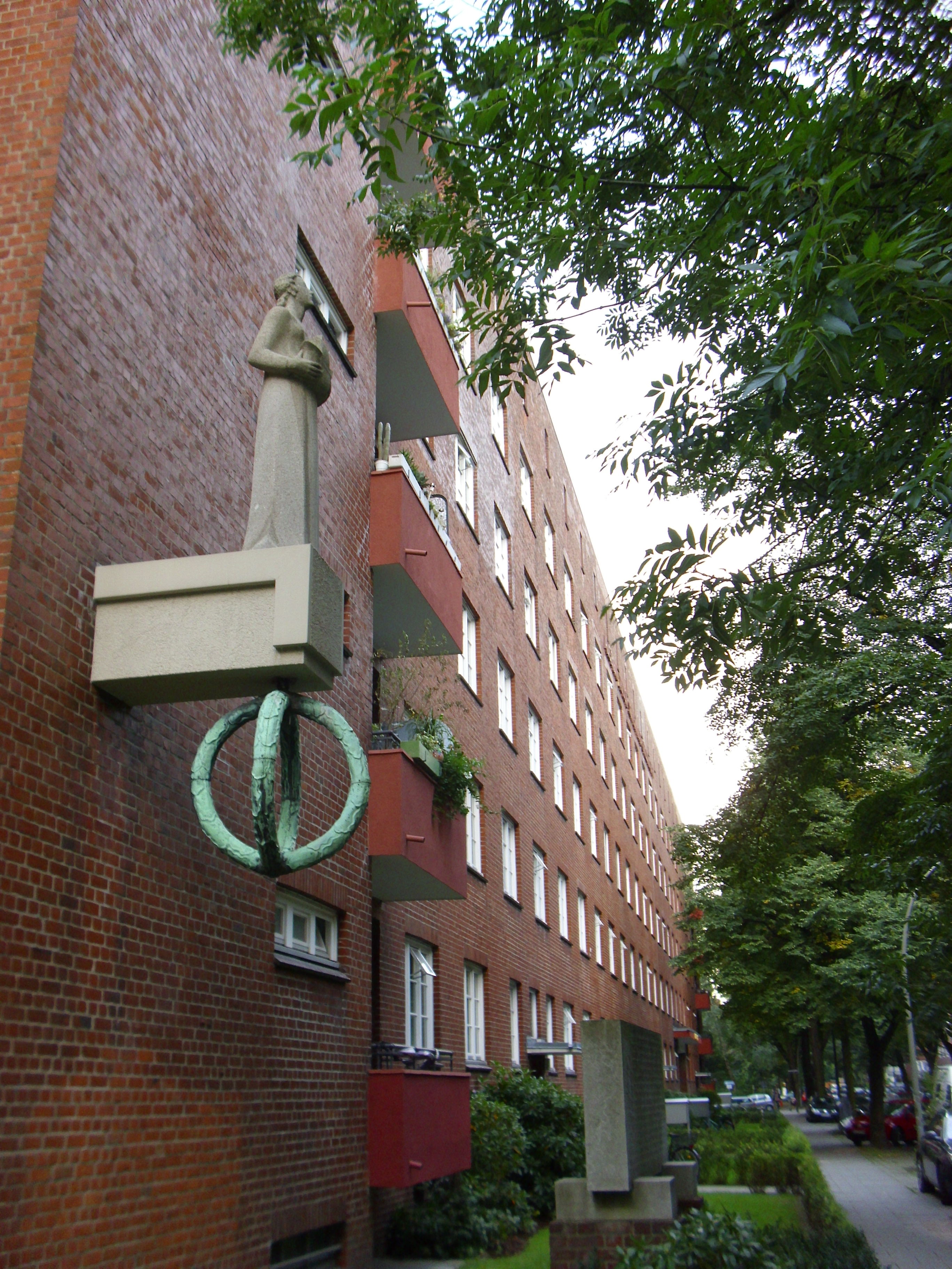 Kranzhaus der Schiffszimmerergenossenschaft, Großheidestraße 20-30 This is a photograph of an architectural monument.